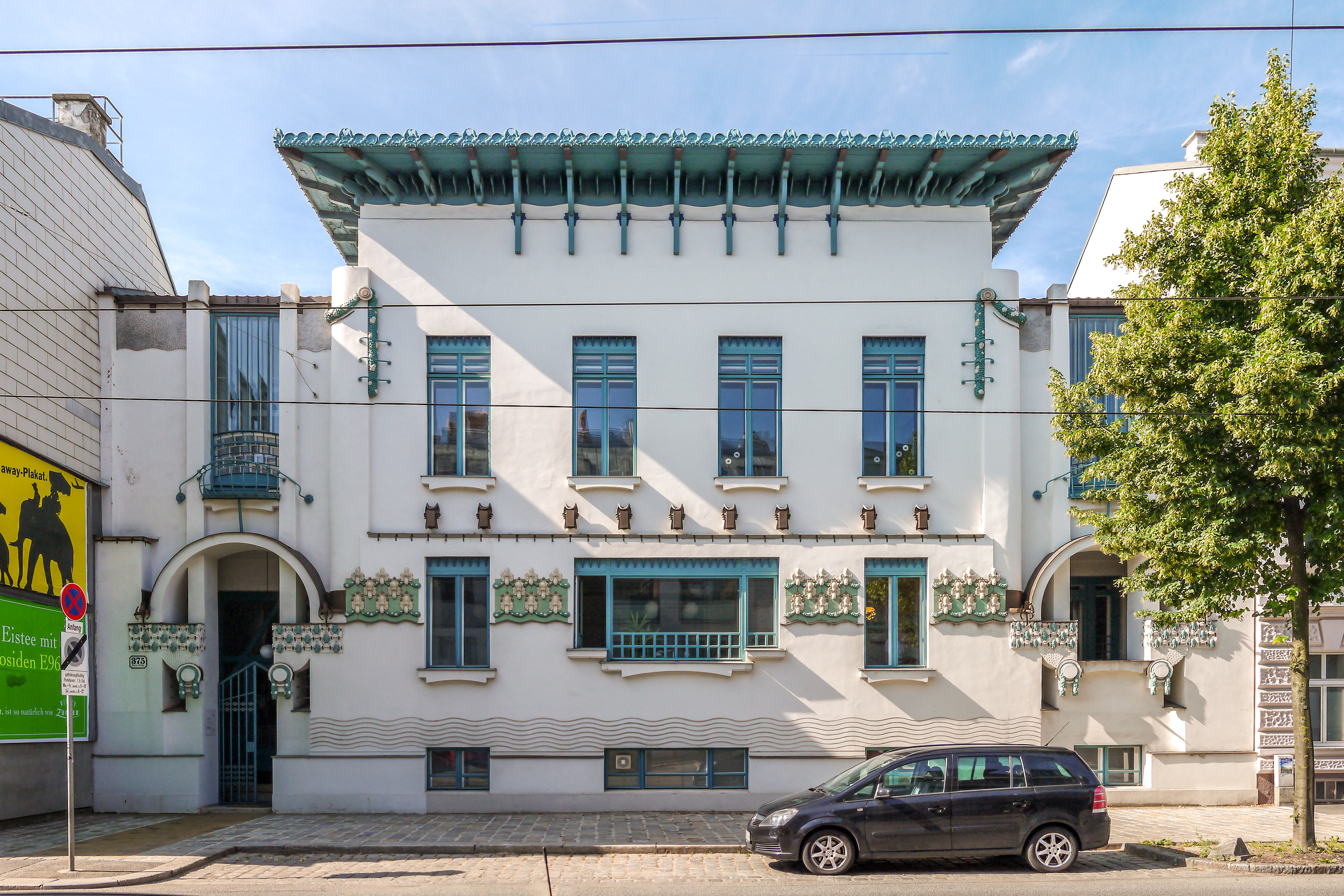 Villa Vojcsik